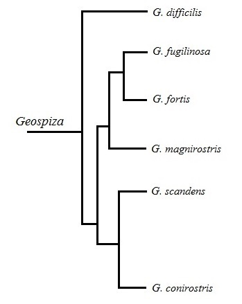 Arbre phylogénétique du genre Geospiza